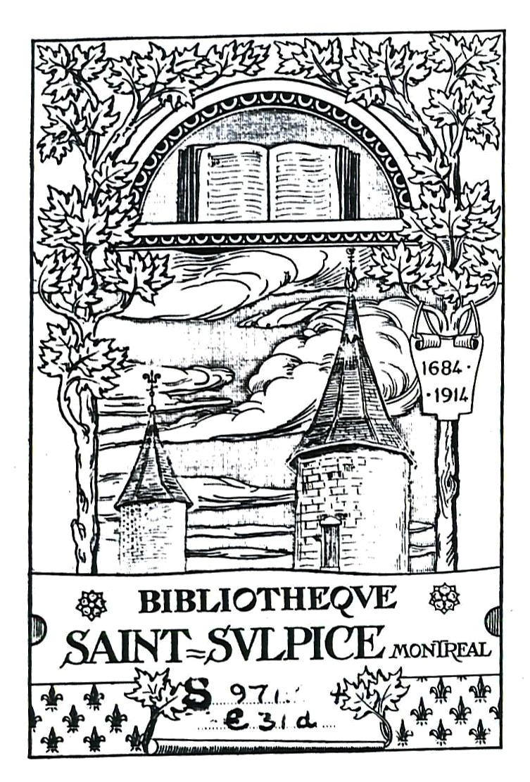 Ex-libris d'un livre de la collection Saint-Sulpice. On remarque les tours du séminaire de Montréal, rue Sherbrooke.